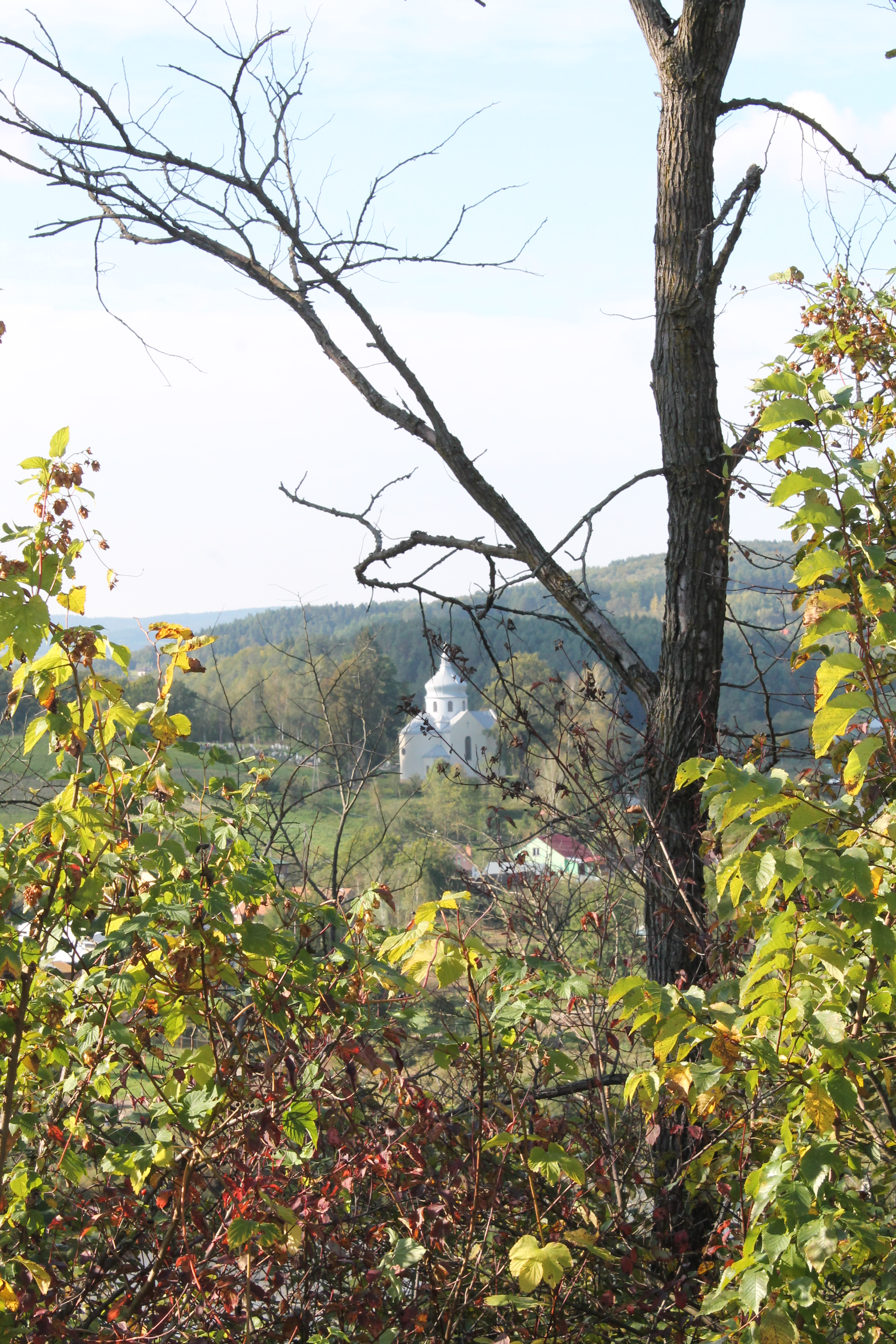 widok na kościół par.p.w. Wniebowzięcia NMP w Zagórzu